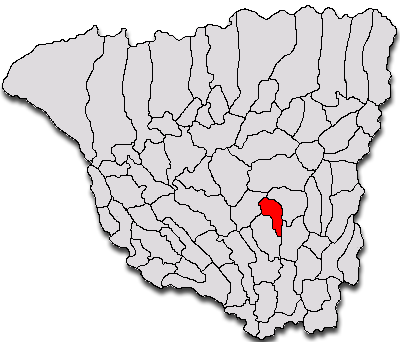 Categorie:Hărţi ale judeţului Gorj